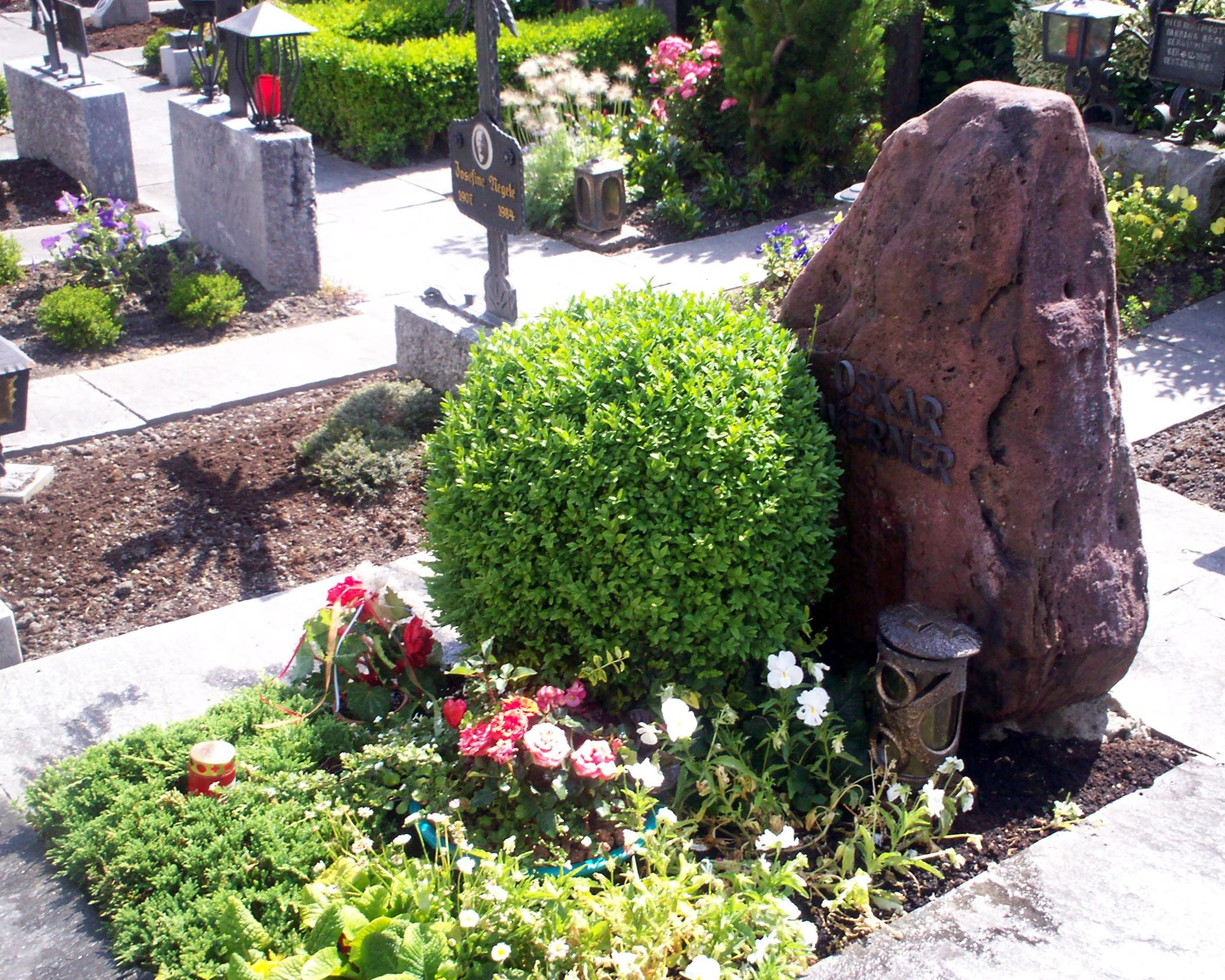 Das Grab des österreichischen Schauspielers OSKAR WERNER auf dem Dorffriedhof in Triesen/Liechtenstein